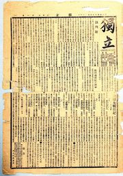 독립 1919년 8월 21일호, 대한민국 임시정부의 기관지